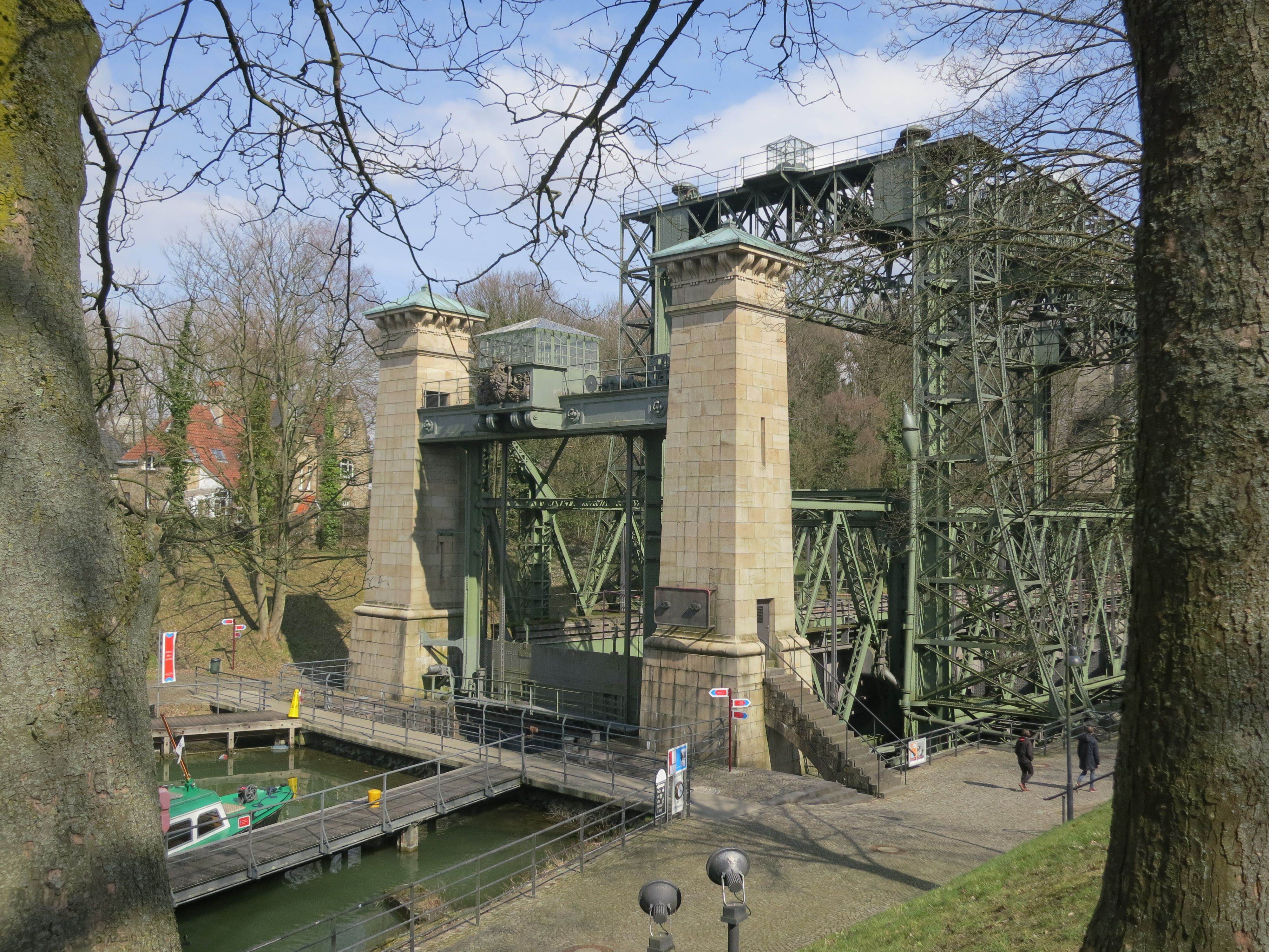 Altes Schiffshebewerk Henrichenburg